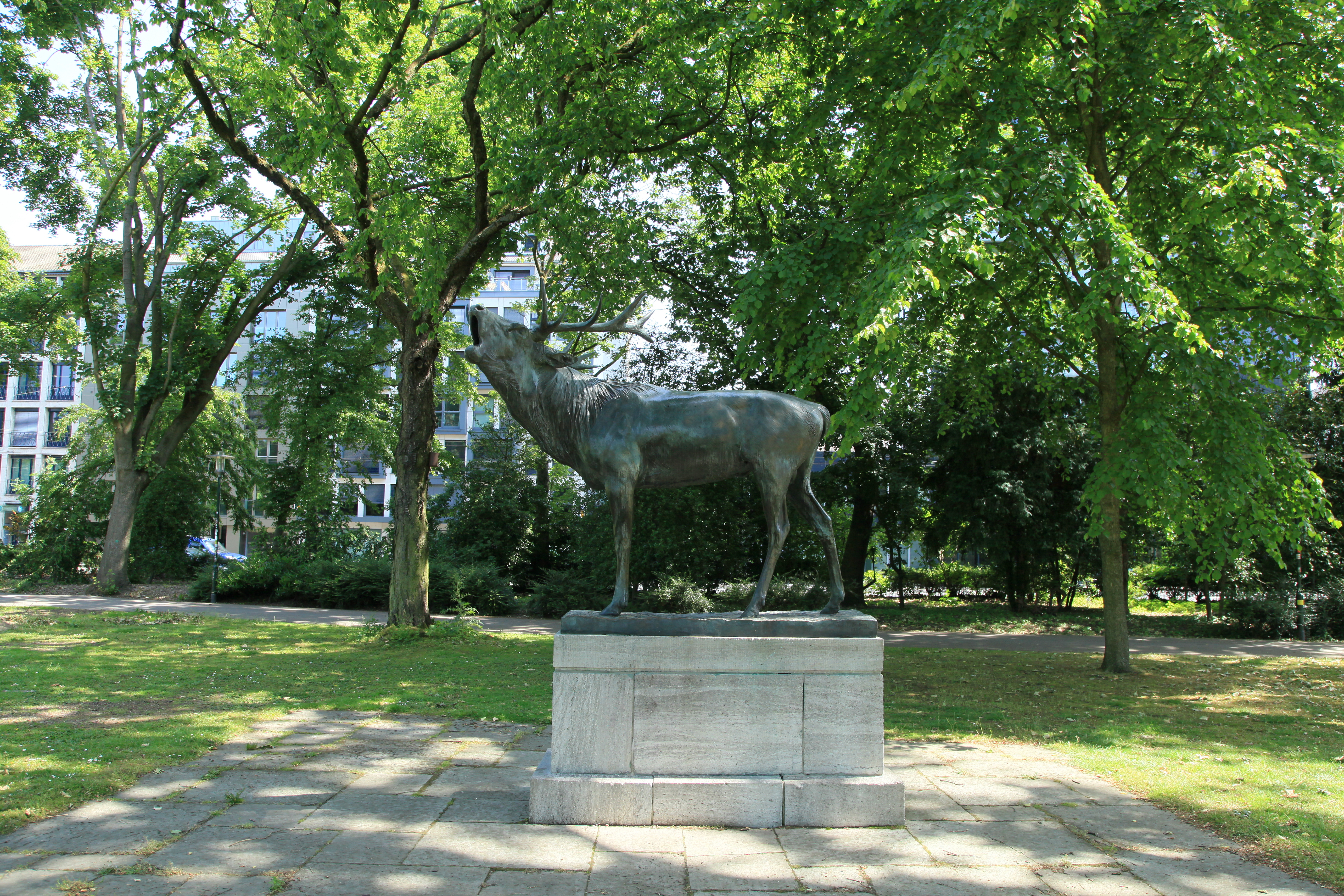 "Röhrender Hirsch" von Josef Pallenberg, Hofgarten in Düsseldorf